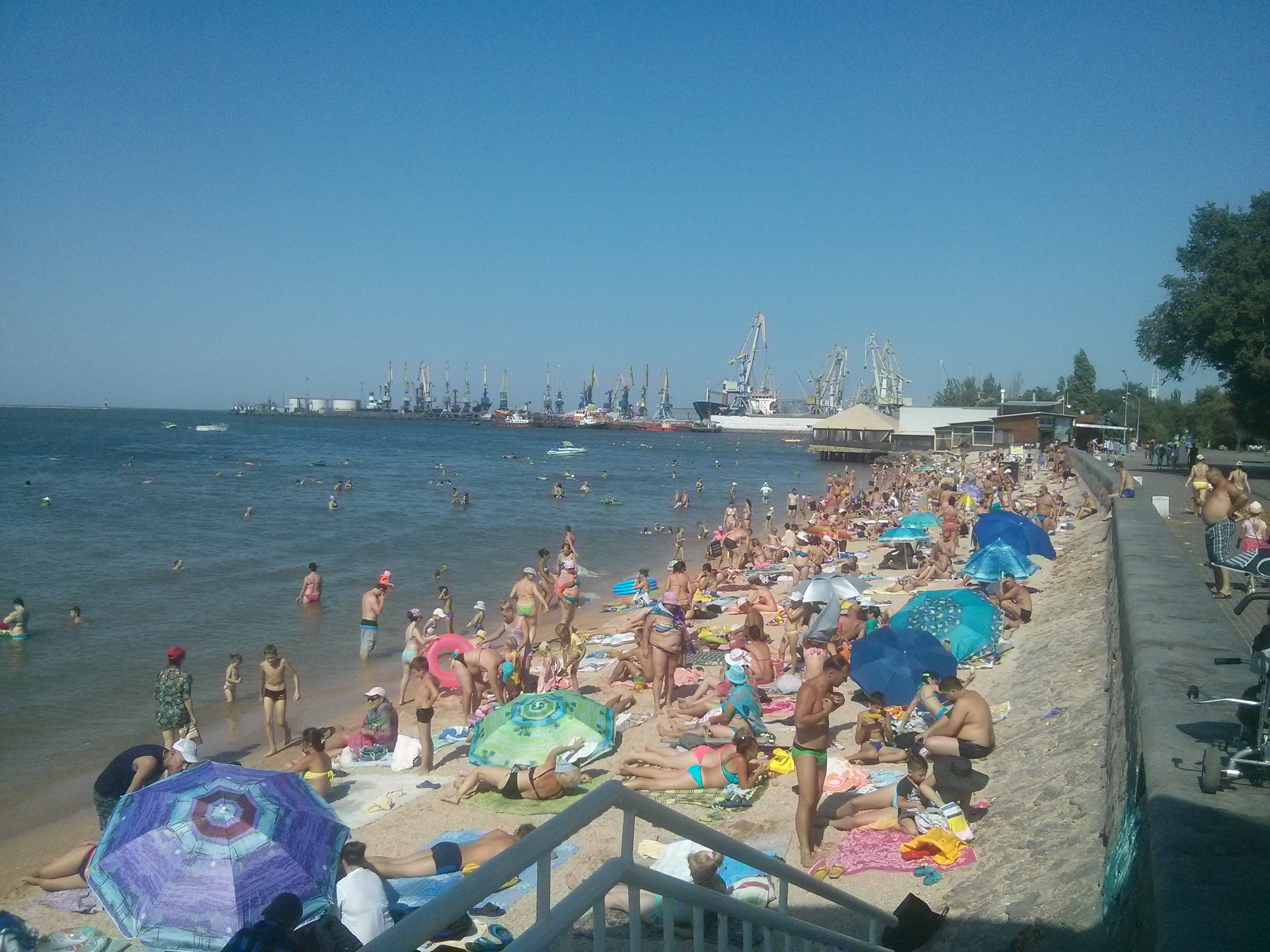 2017 рік